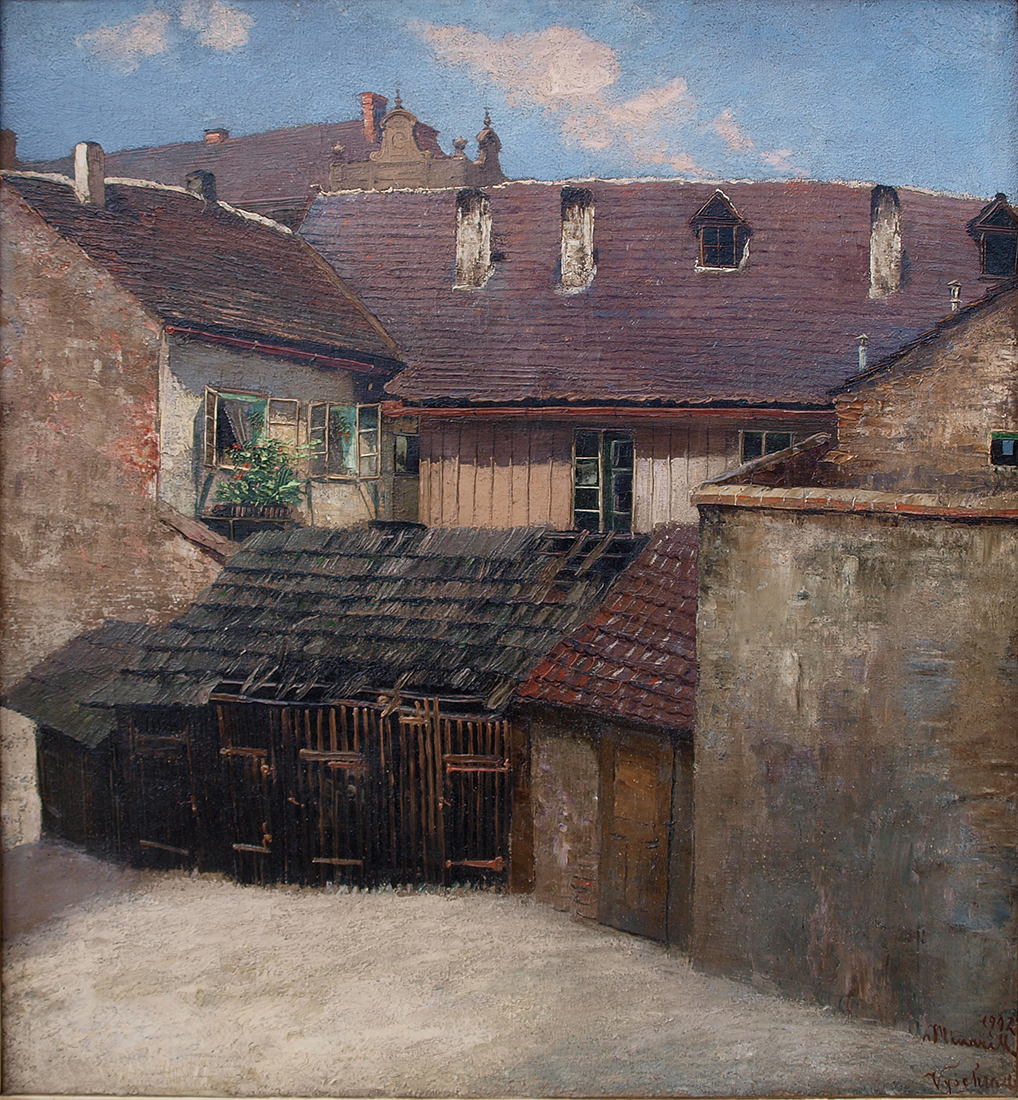 Jan Bedřich Minařík: Dvorek na Vyšehradě